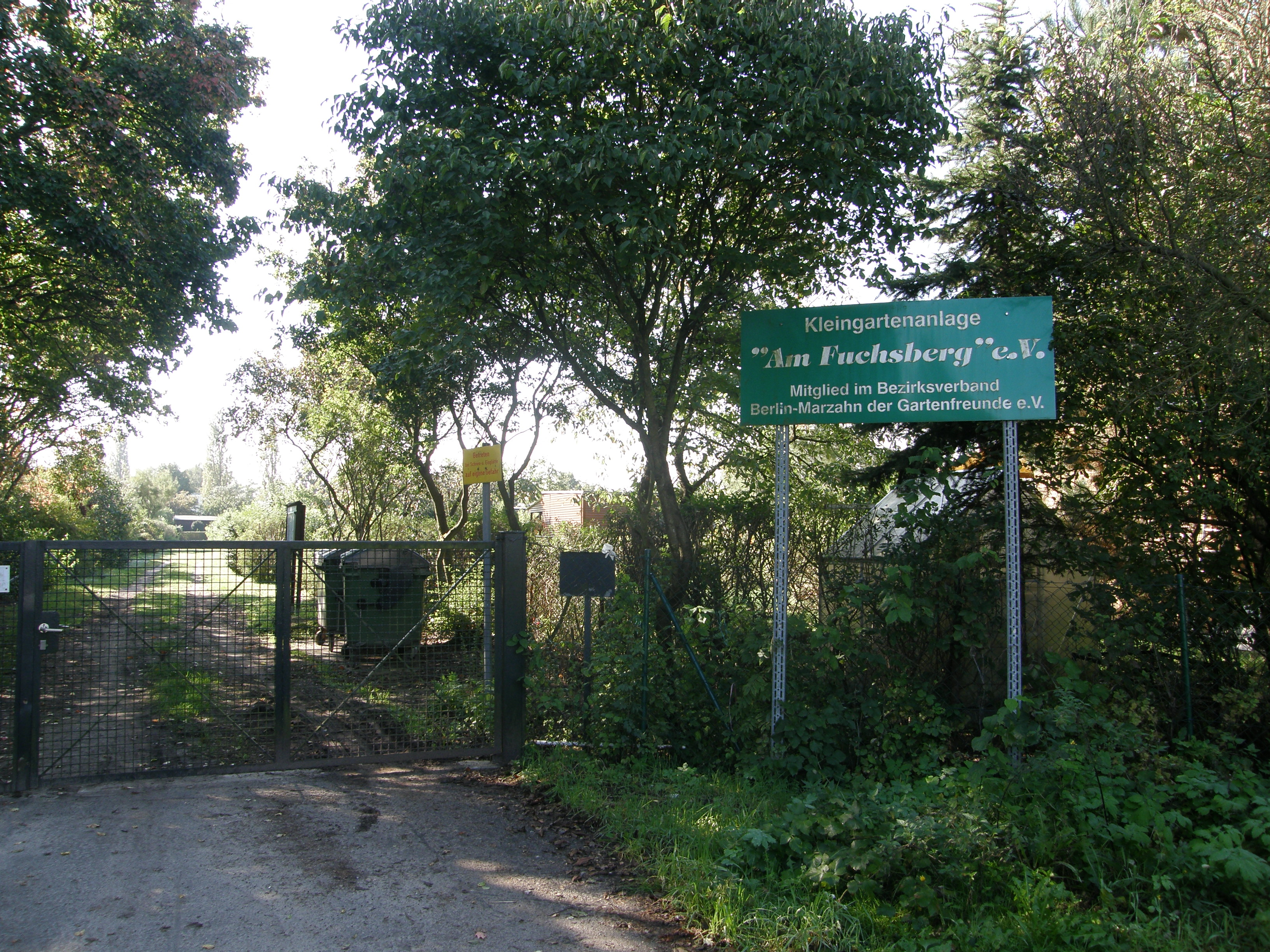 Berlin-Biesdorf, KGA Am Fuchsberg, Zugang Arnsberger Str.